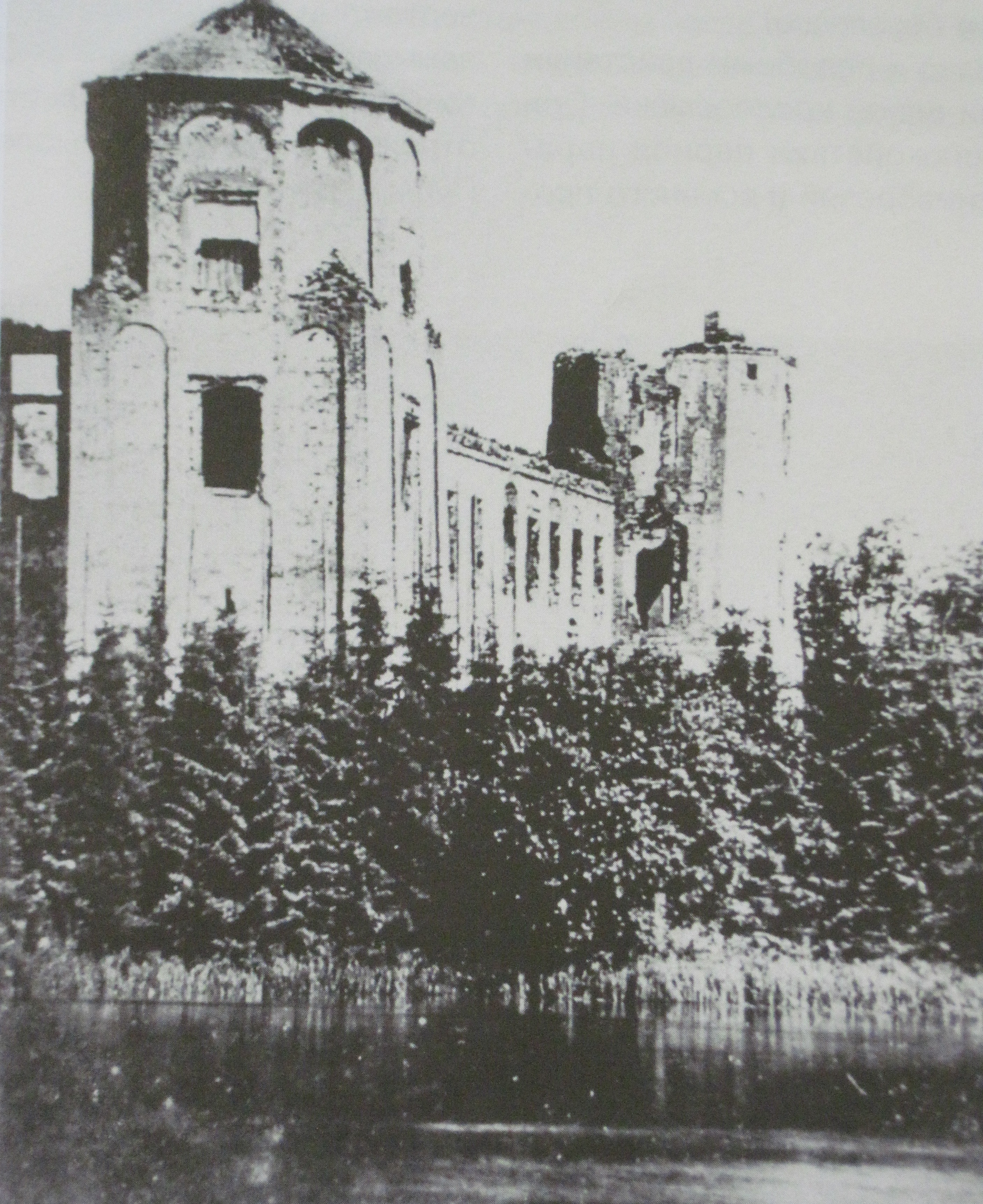 Мірскі замак у канцы 19 - пачатку 20 ст.